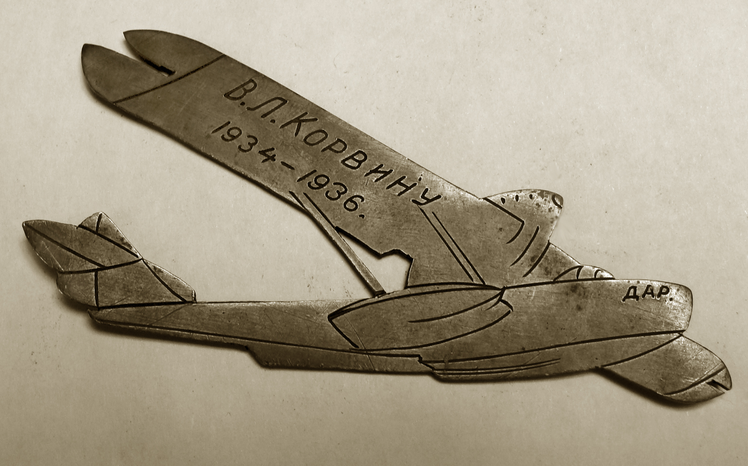 Именной значок в честь создания гидросамолета Р.Л. Бартини "ДАР"